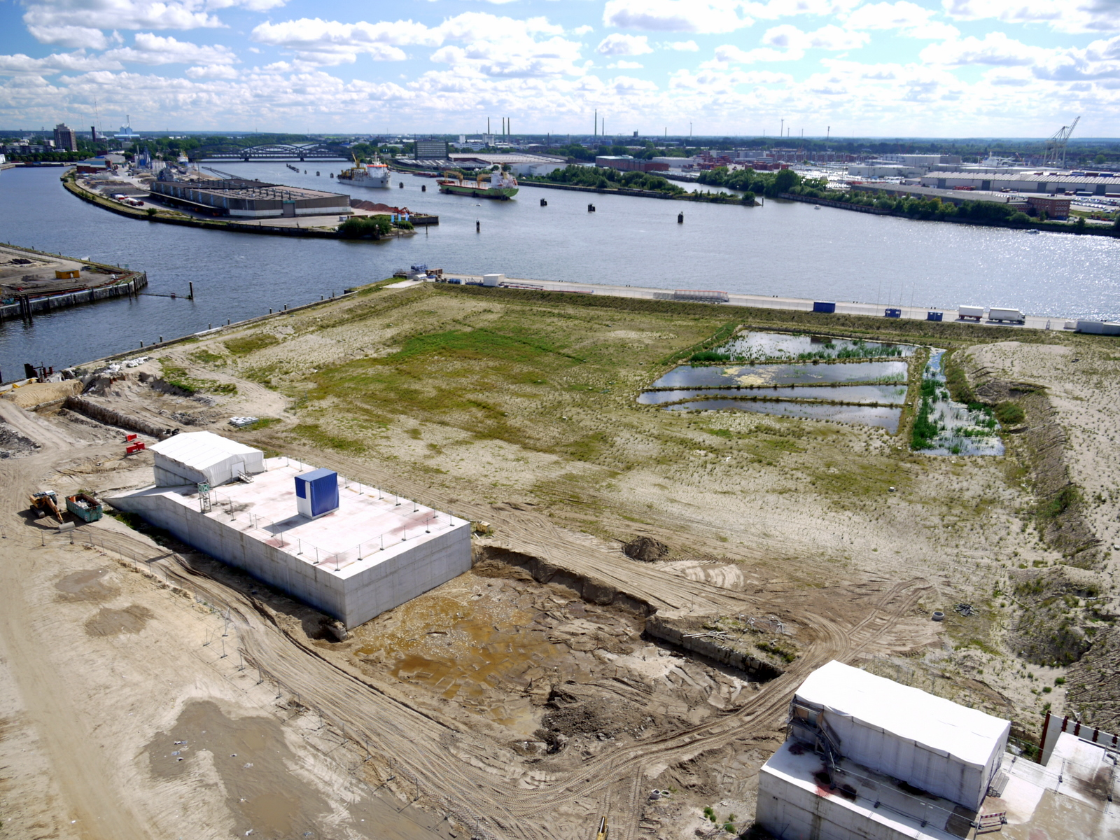 Südteil des Überseequartiers im September 2010 vom Riesenrad aus.